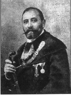 Hollán Sándor államtitkár. Meggyilkolták 1919. április 22-ről 23-ra virradóra. A kép nyomtatott változatának felirata ez volt: Április 23. A Lánchíd budai pillérénél meggyilkolt apa és fia: Idős Hollán Sándor.